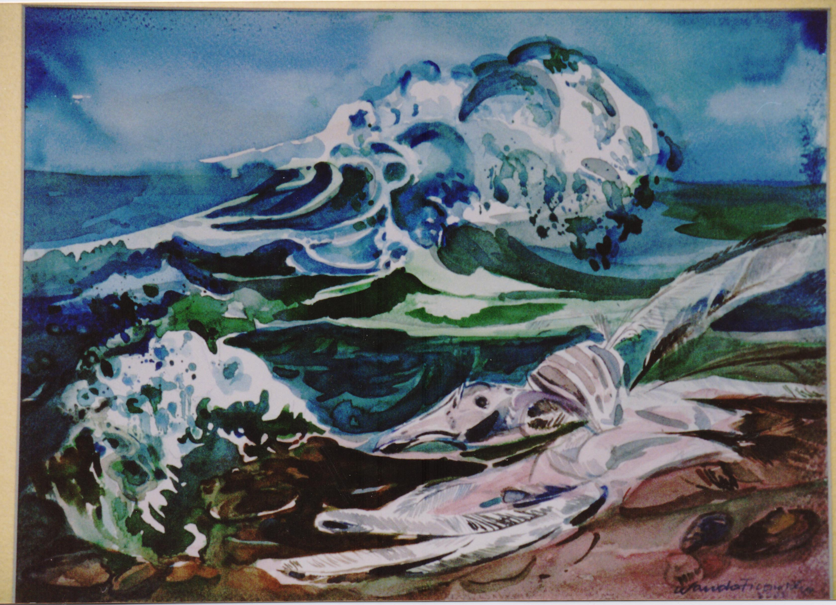 Wanda Ficowska - Fale